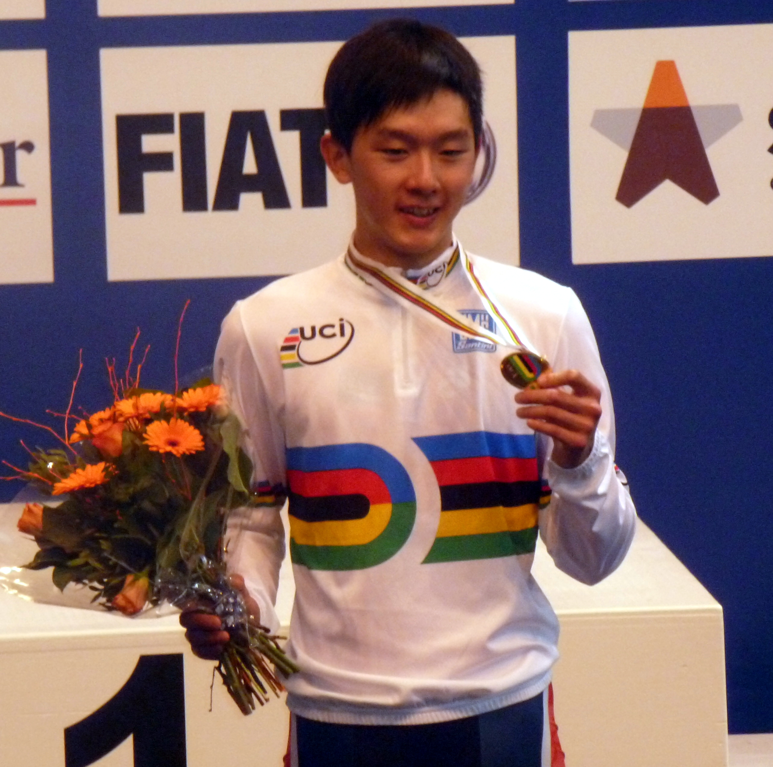 Ho Ting Kwok, Radrennfahrer aus Hongkong